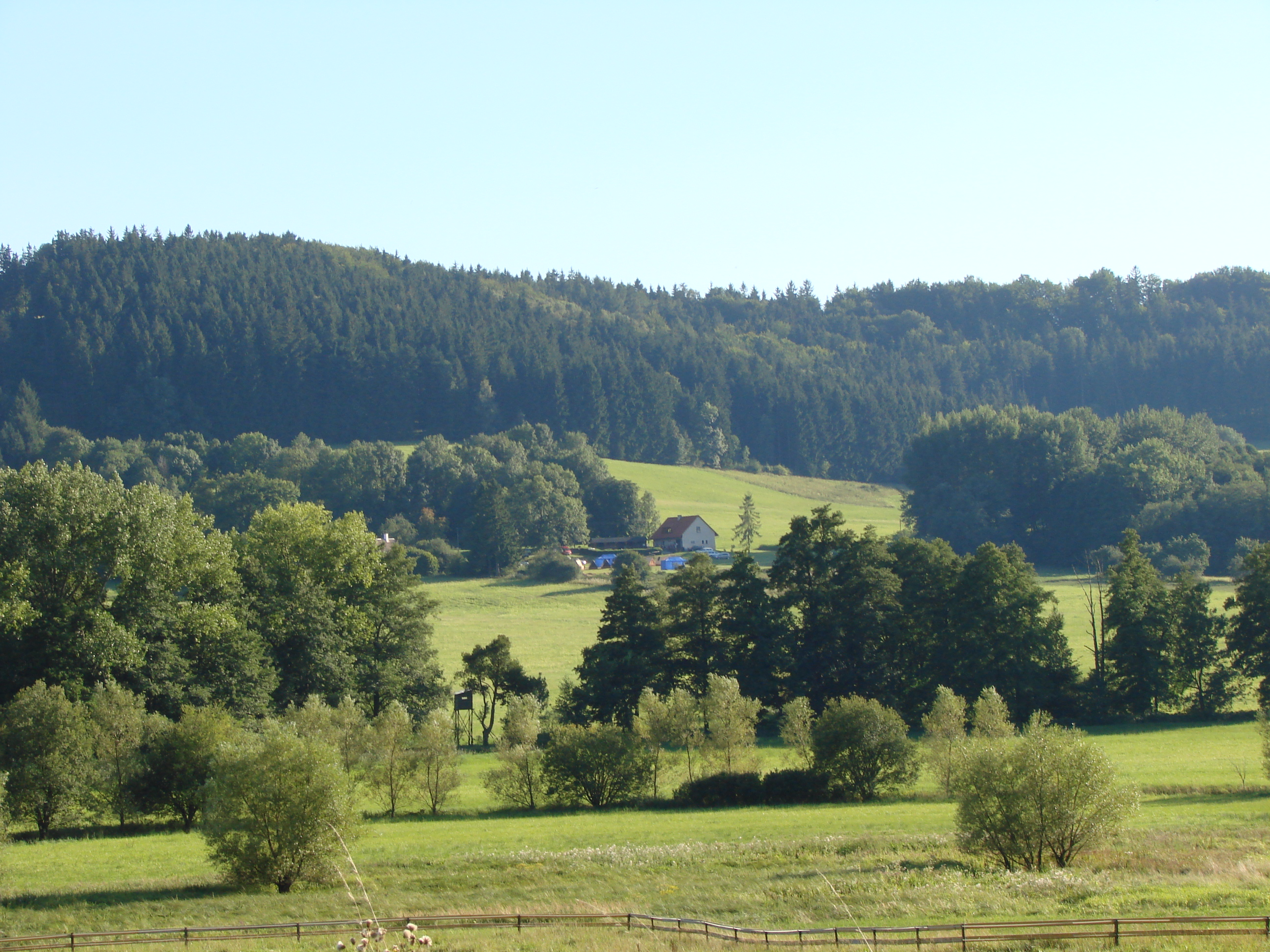 Usedlost na Branišově, místní části Podmoklan, okres Havlíčkův Brod, Kraj Vysočina